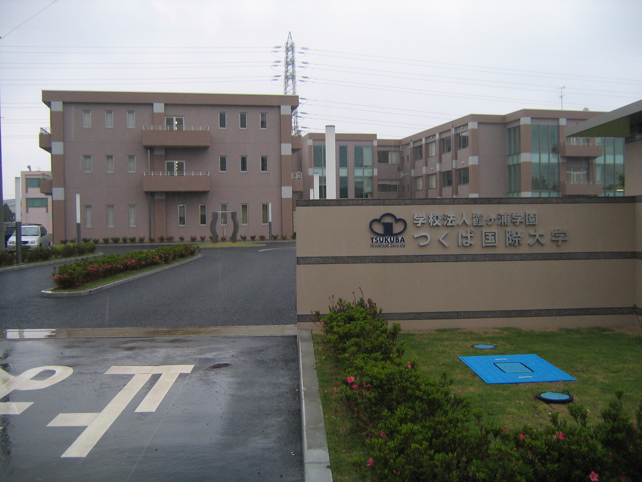 つくば国際大学第二キャンパス